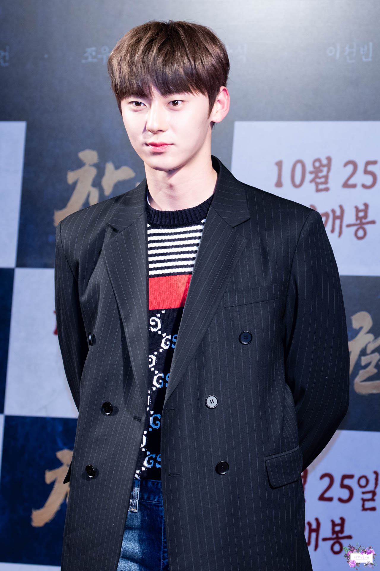 181018 창궐 VIP시사회 셀러브리티